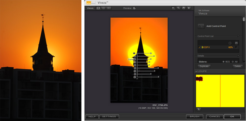 Demonstration einer Bildverfremdung mit der U Point-Technologie unter Nik Viveza